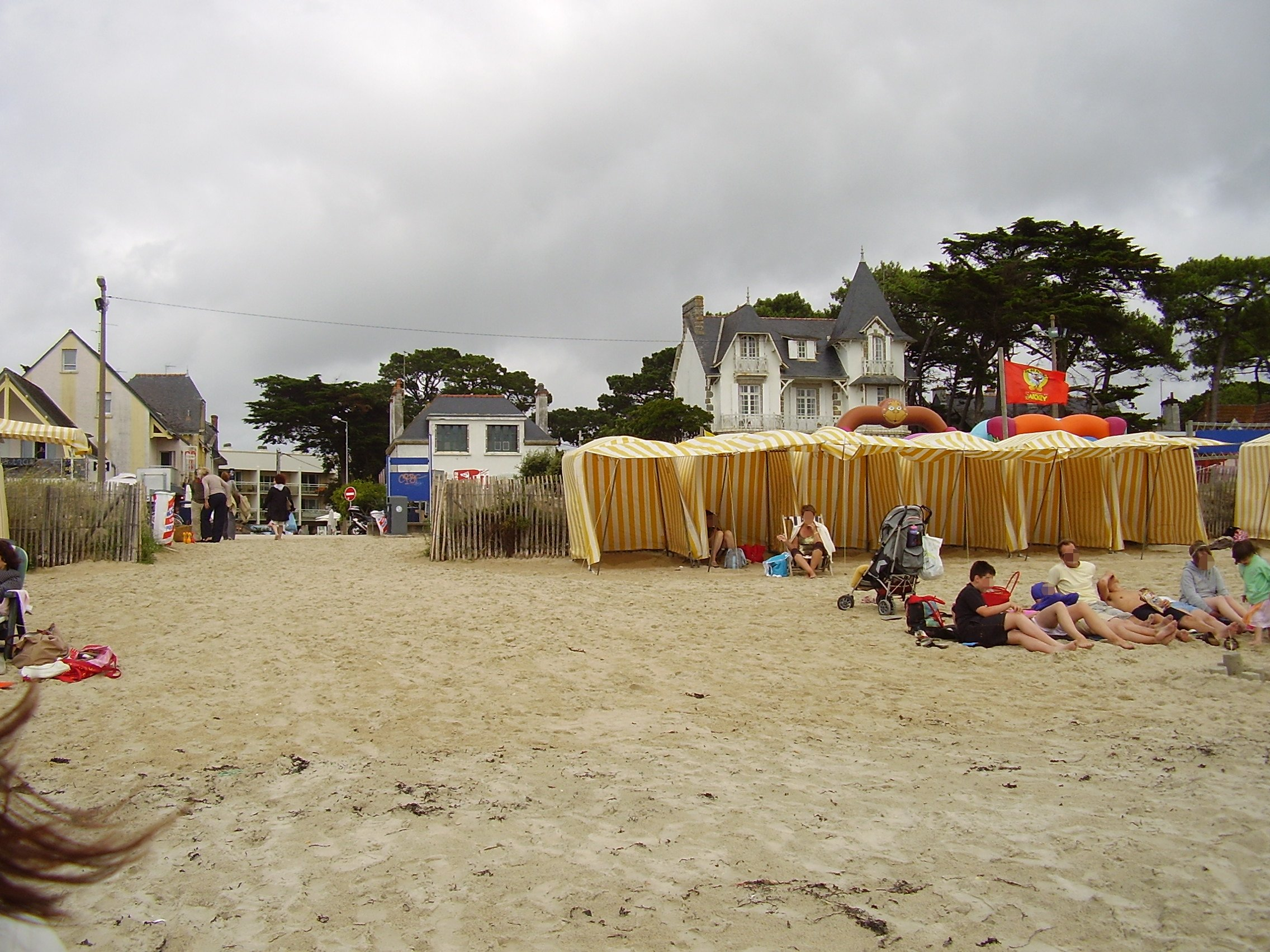 Carnac, Frankreich